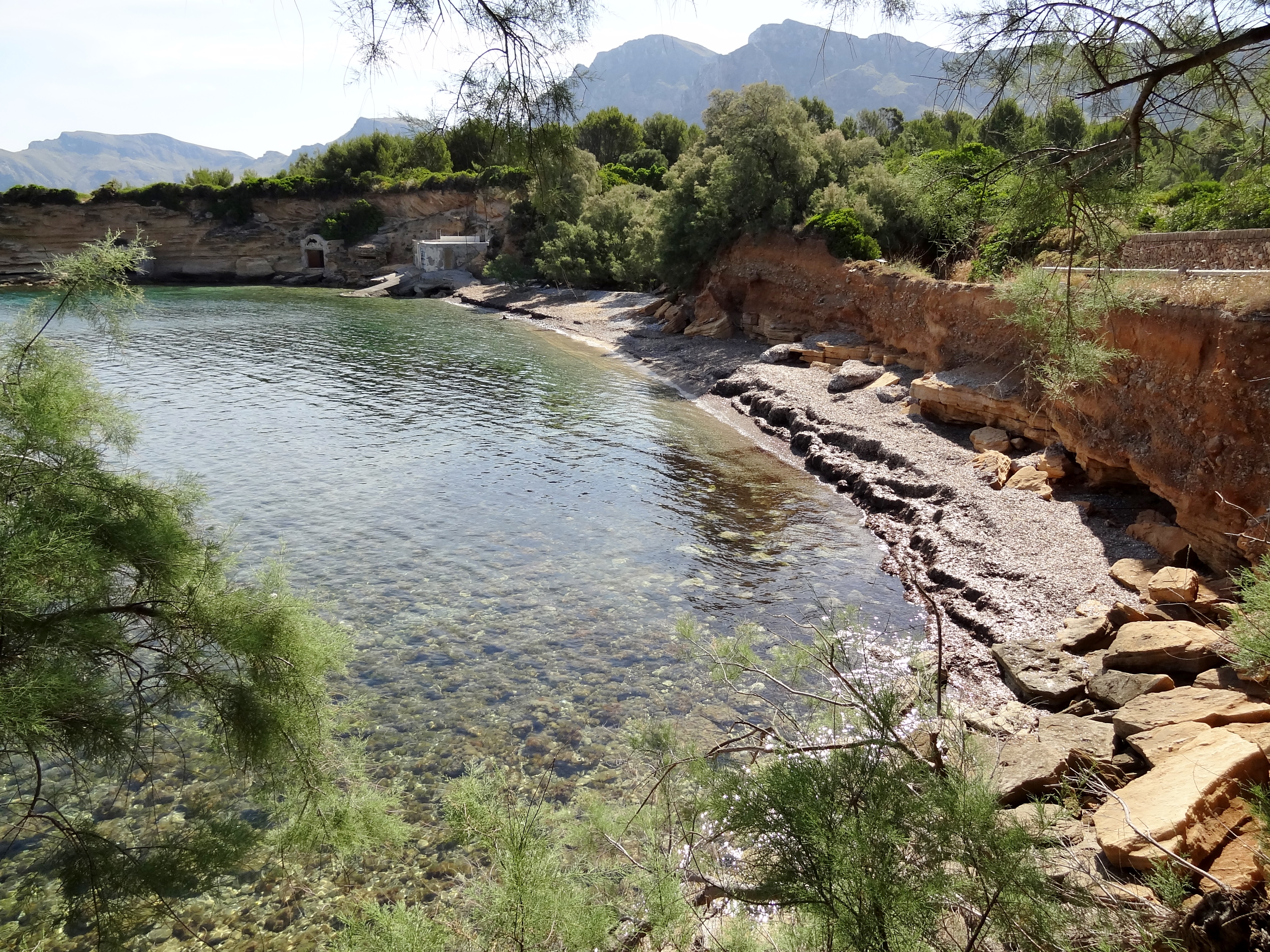 Cala des Camps, Gemeinde Artà, Mallorca, Spanien